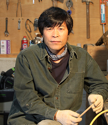 조각가 이영섭 작업실